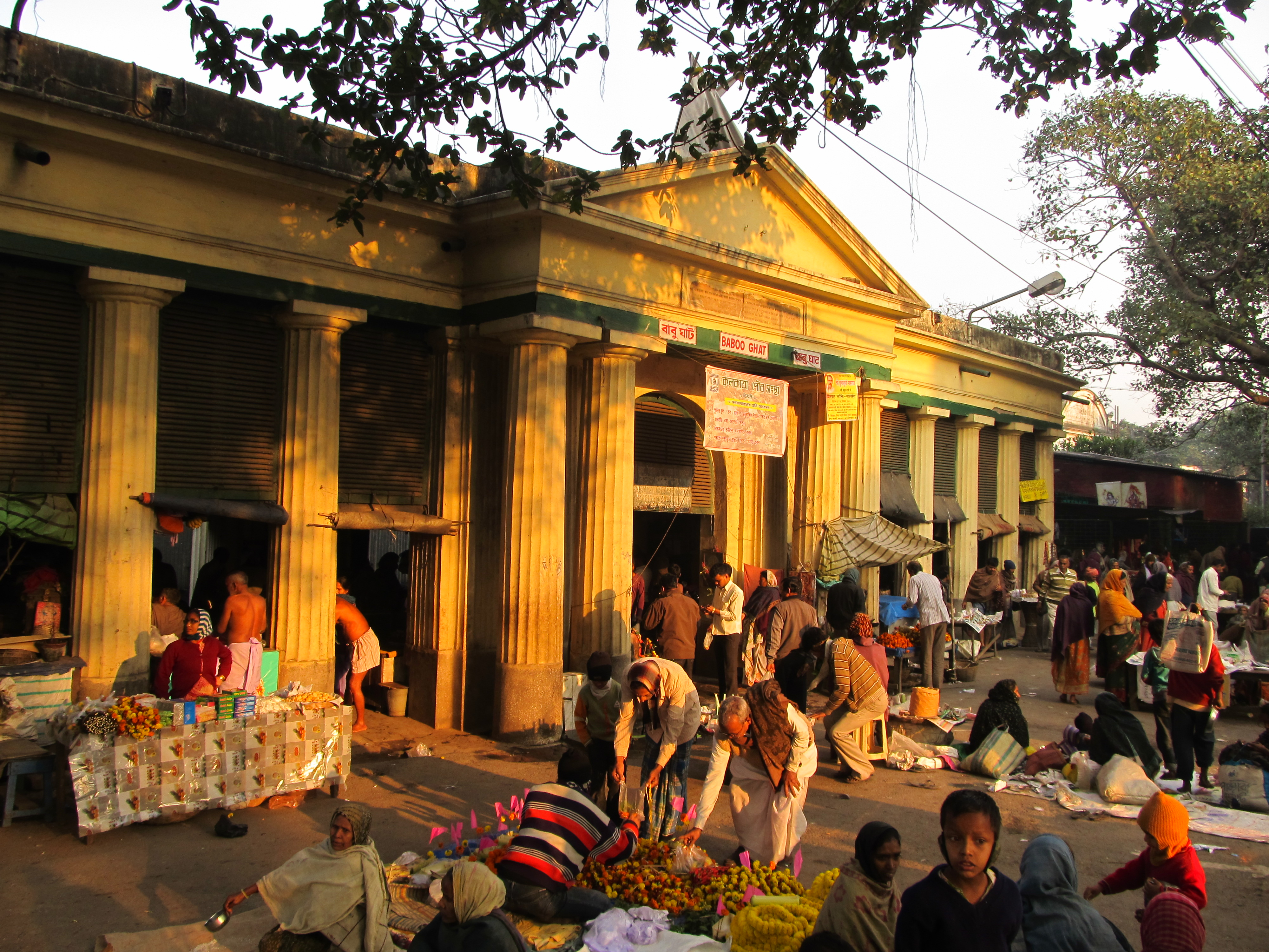 Photographed at Kolkata.